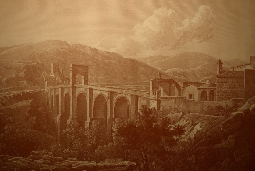 Grabado mostrando el puente de Alcántara en estado de a principios del siglo XIX